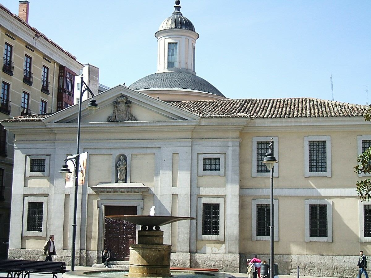 Real Monasterio de San Joaquín y Santa Ana, Valladolid, España